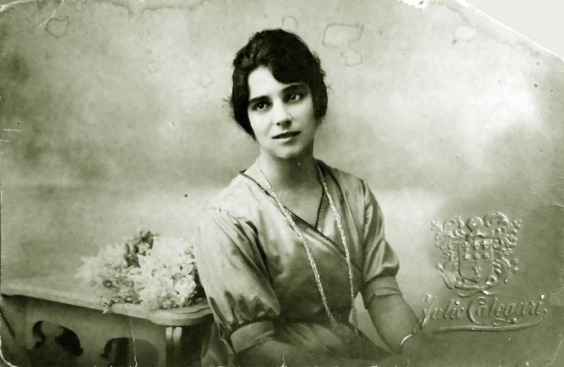 Foto de modelo não identificadoa, reprodução de foto de Julio Calegari pertencente à coleção da família Frantz.